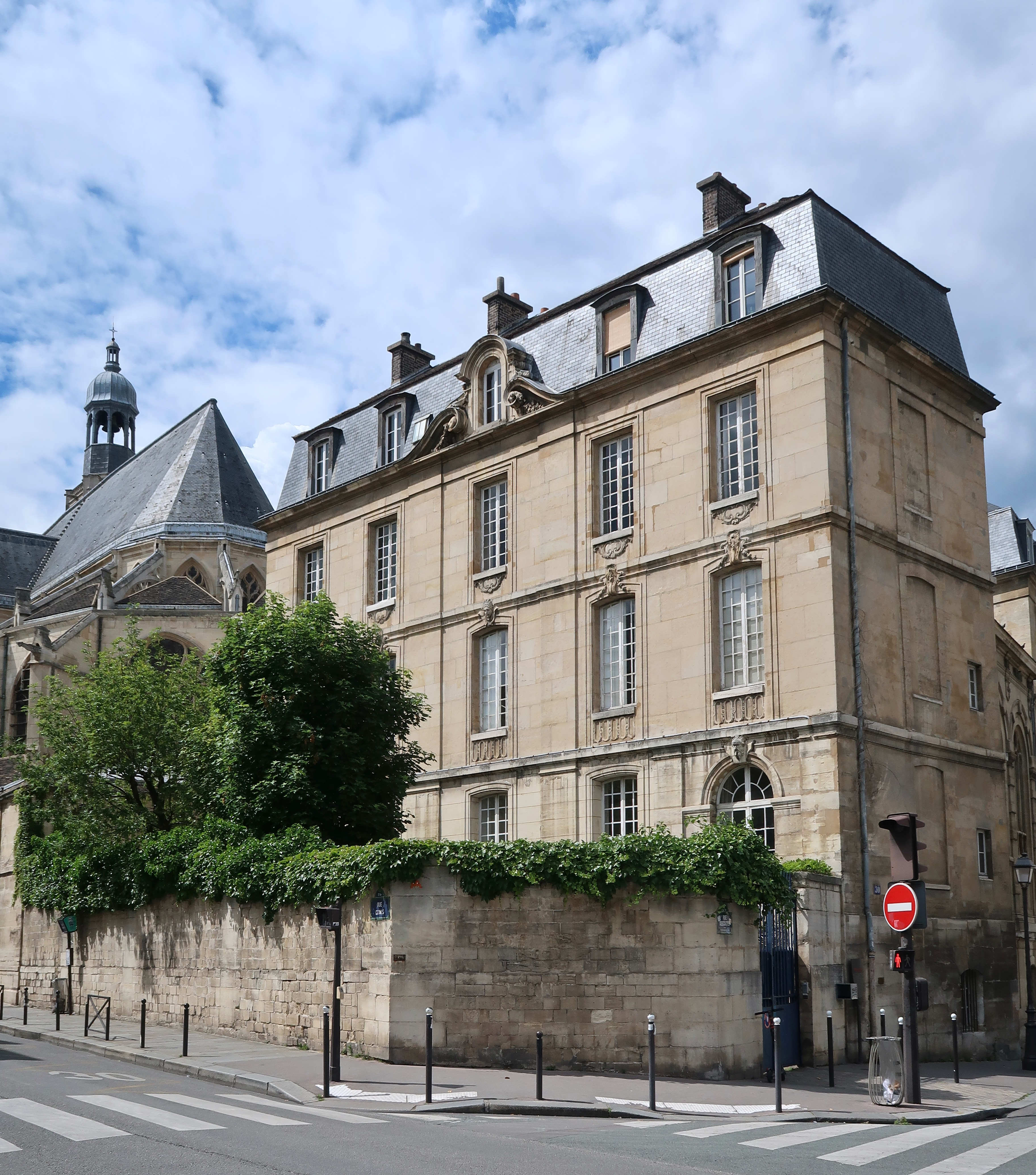 Hôtel particulier à l'angle des rues Clovis et Descartes, n°30 (Paris, 5e).